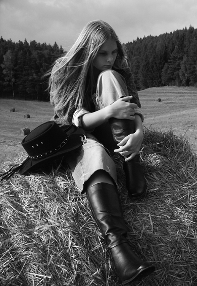 Za objektivem stál můj bývalý přítel s uměleckou přezdívkou Sam.